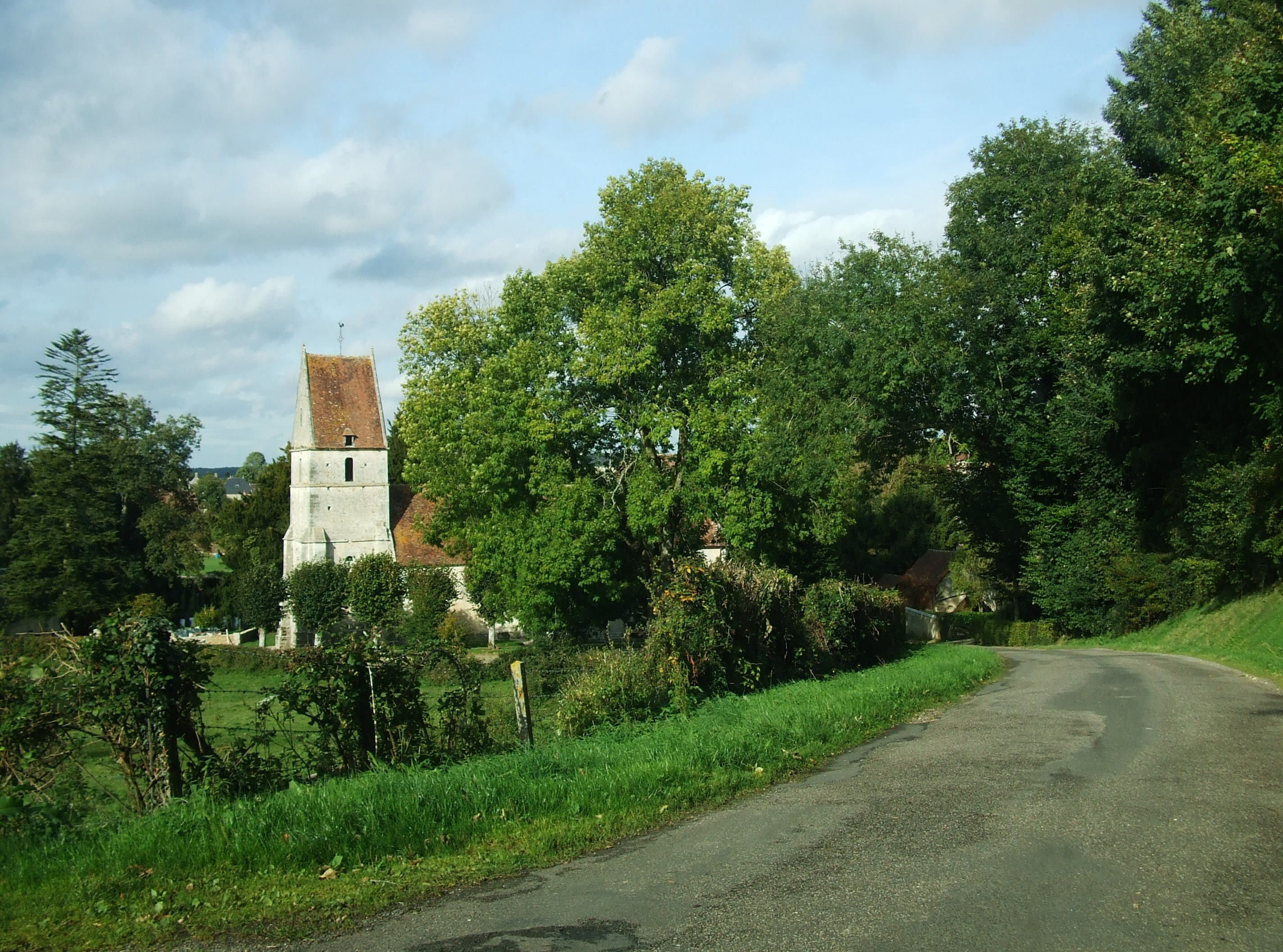 église de Habloville en venant de Giel-Courteilles